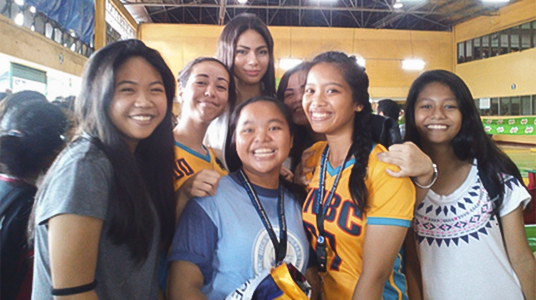 Miss Milo Little Olympics 2011